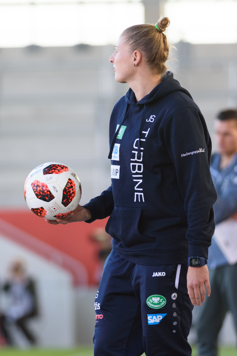 Josephine Schlanke at FC Bayern vs Turbine Potsdam